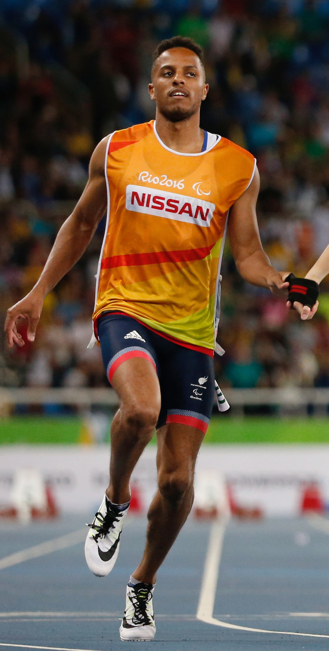 Rio de Janeiro - Brasileira Terezinha Guilhermina disputa final dos 100m T11 ao lado da britânica Libby Clegg, que levou ouro, nos Jogos Paralímpicos Rio 2016, no Estádio Olímpico. (Fernando Frazão/Agência Brasil)